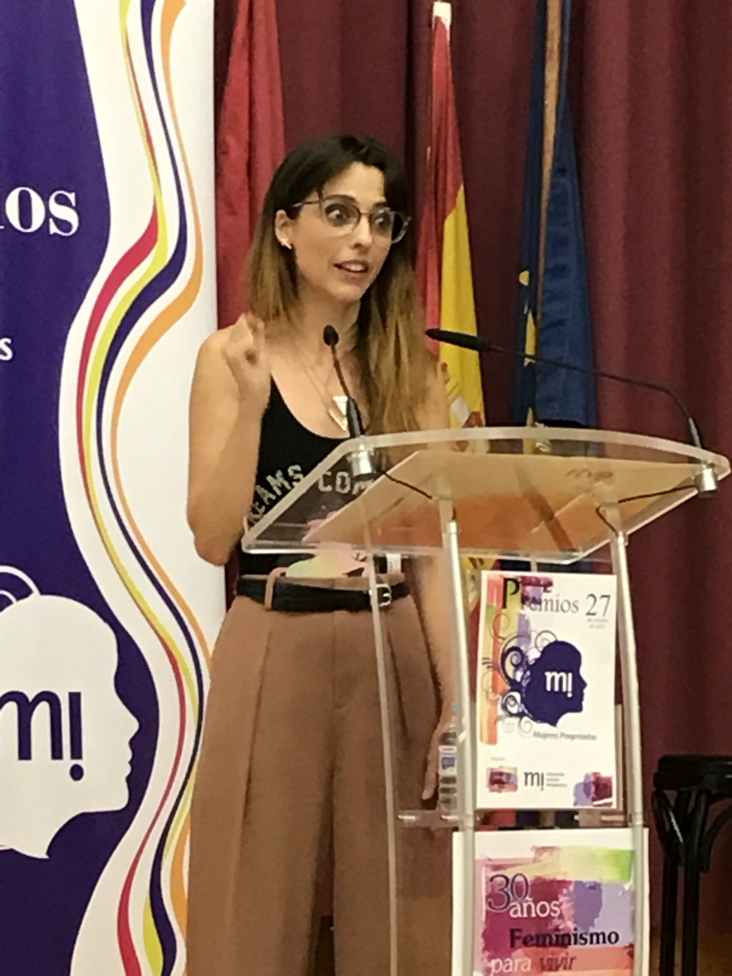 Dolera, recibe el premio Mujeres Progresistas Categoría Cultura/Medios “por su constante búsqueda de la movilización de conciencias, y especialmente por su compromiso con la igualdad de género y el feminismo que traslada a su disciplina artística